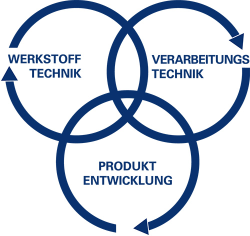 Aufgabenbereiche der IKT